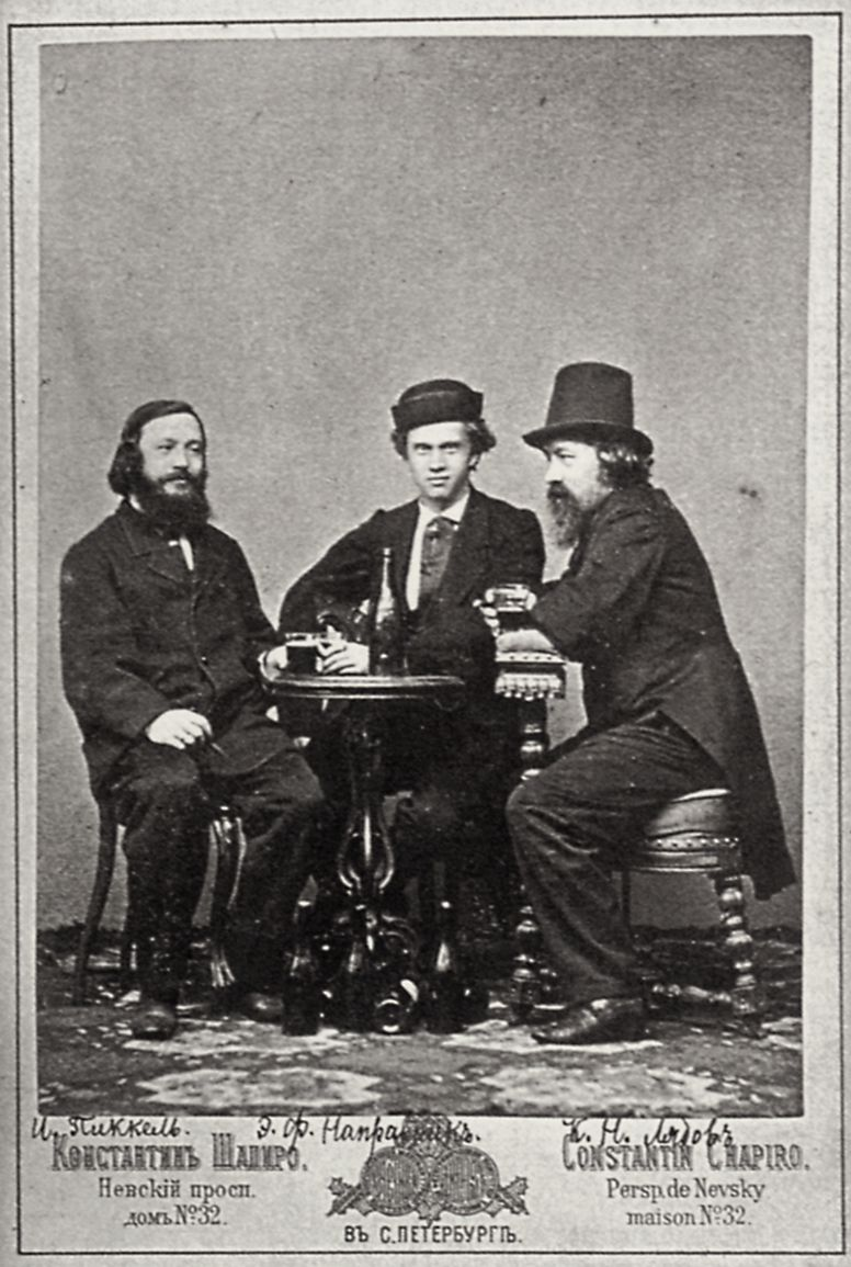 apiro, Konstantin: Der Geiger I. Pikkel und die Komponisten E. Napravnik und K. Ljadov. St. Petersburg